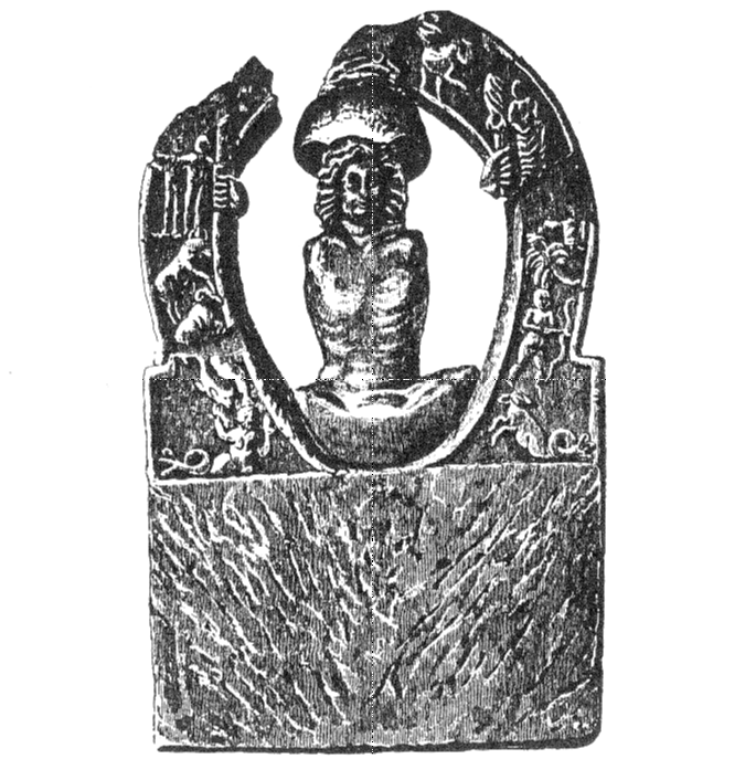 Mithrasrelief aus Housesteads (Hadrianswall), gefunden im Mithräum um 1898.